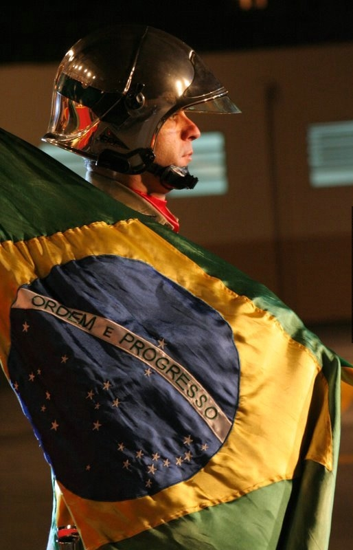 Comemoração do Dia Nacional do Bombeiro.